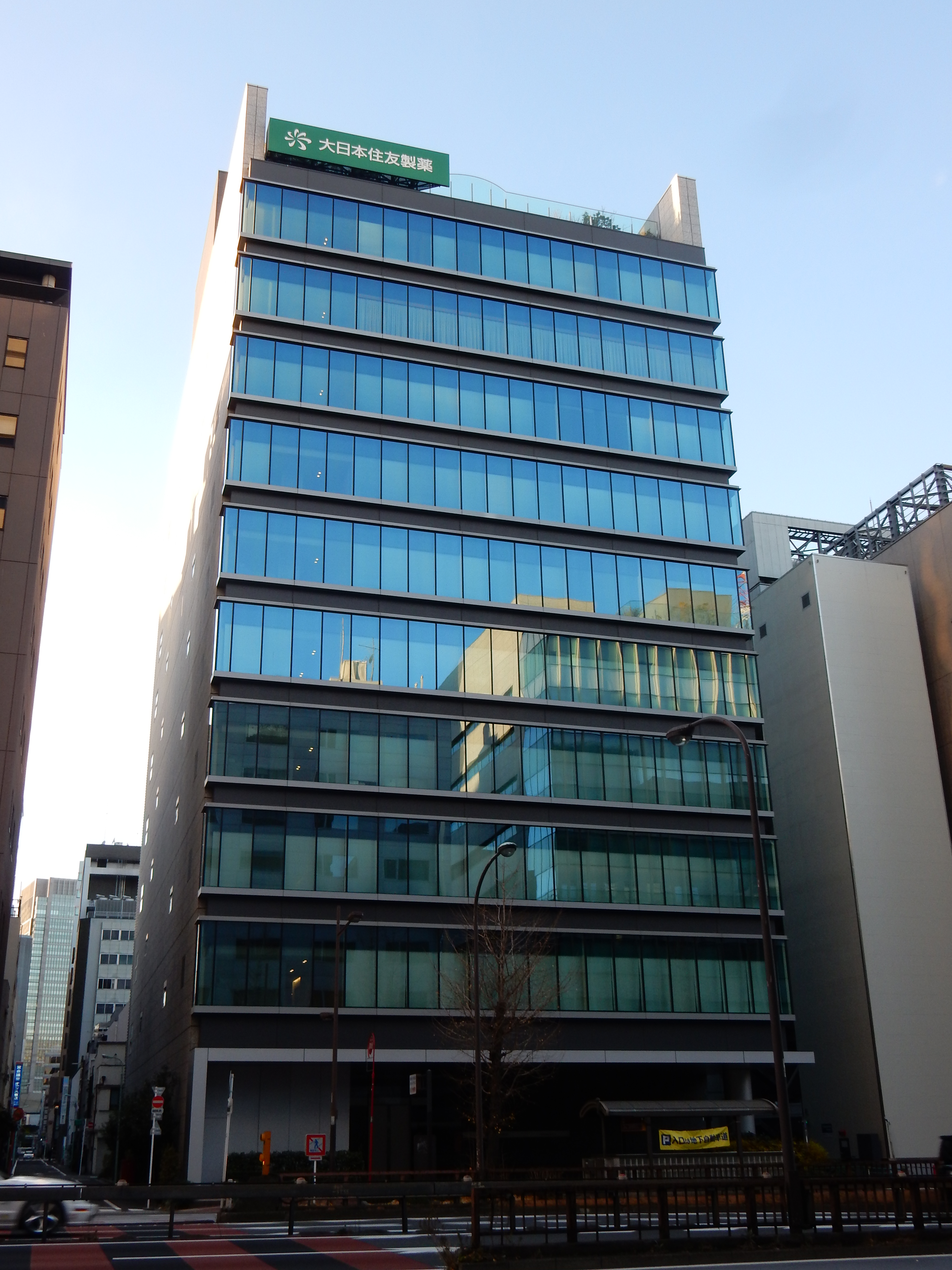 大日本住友製薬東京本社。東京都中央区京橋一丁目13番1号